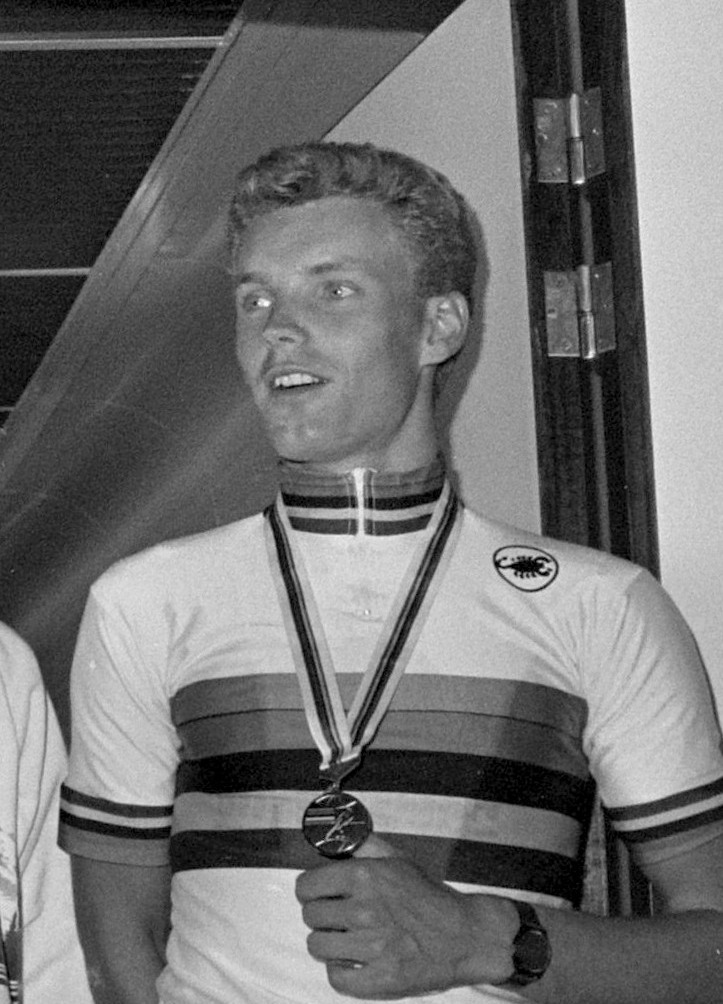 Aankomst Nederlandse Amateurwielerploeg uit Colorado op Schiphol; Rob Harmeling